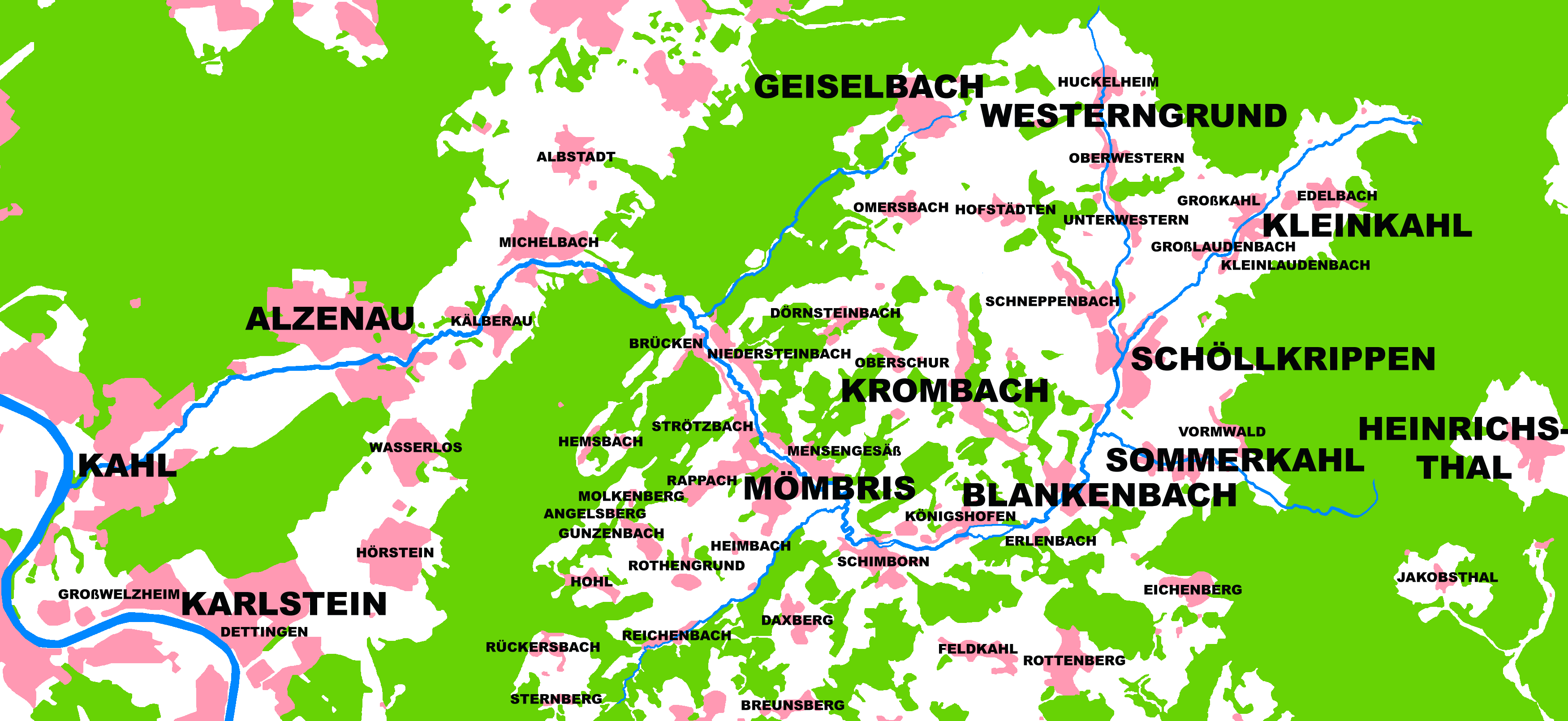 Orte im Kahlgrund (ehemaliger Landkreis Alzenau) Grünfläche, Wiesen Siedlungsfläche Wald Gewässer